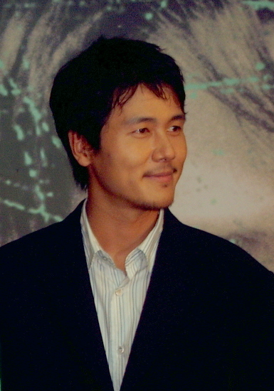 2004년 7월 7일 서울극장에서 열린 영화 《거미숲》 기자시사회에 참석한 배우 감우성.